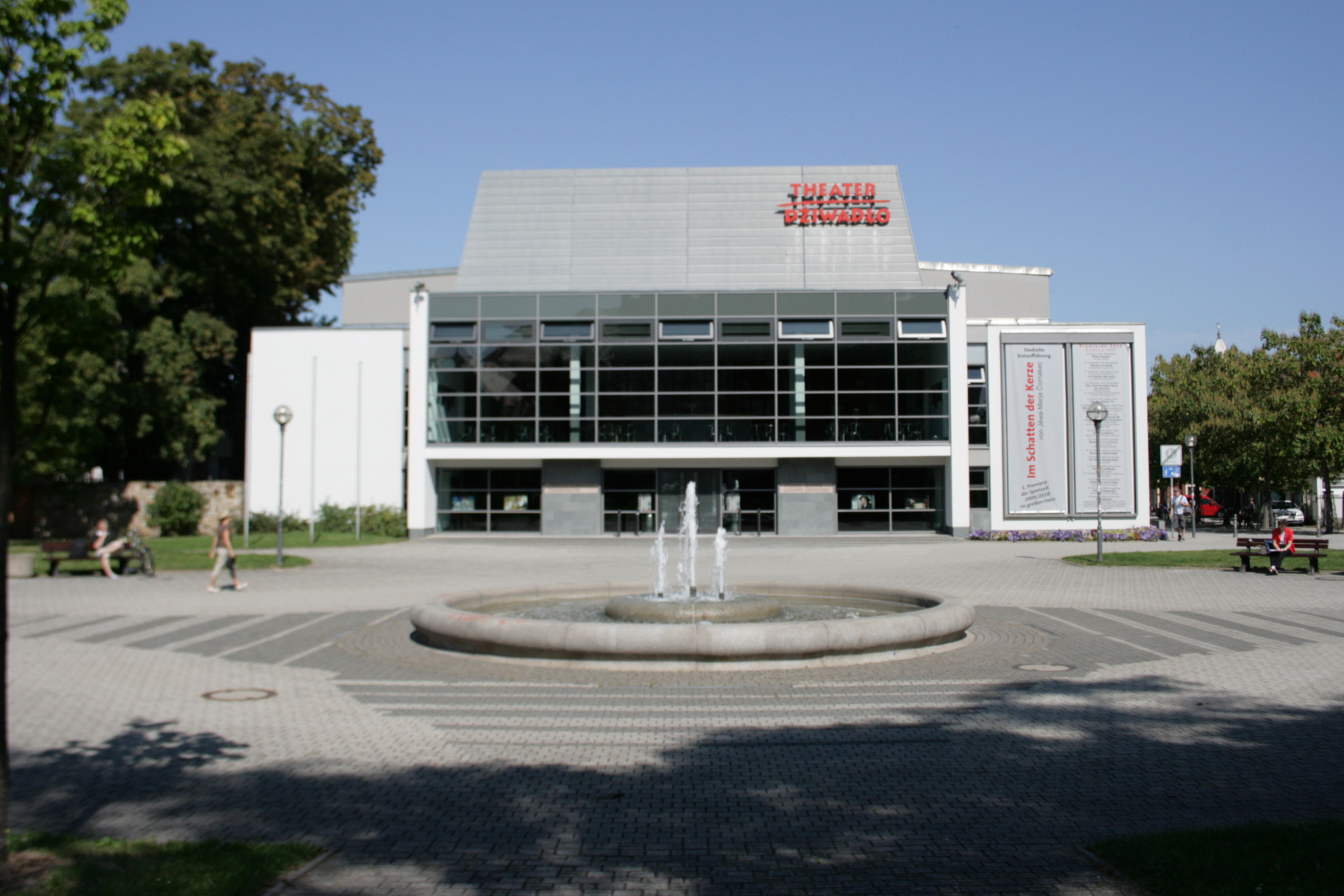 Deutsch-Sorbisches Volkstheater an den Schilleranlagen in Bautzen Hornjoserbsce: Němsko-serbske ludowe dźiwadło w Budyšinje.